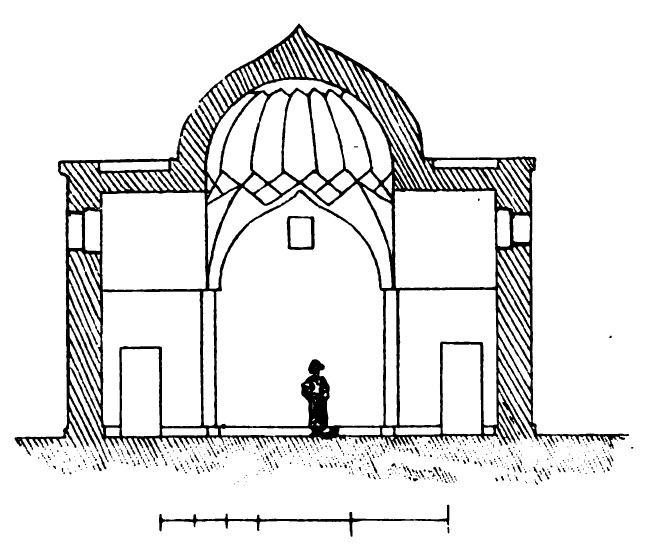 Усыпальница матери и сына Хана в разрезе